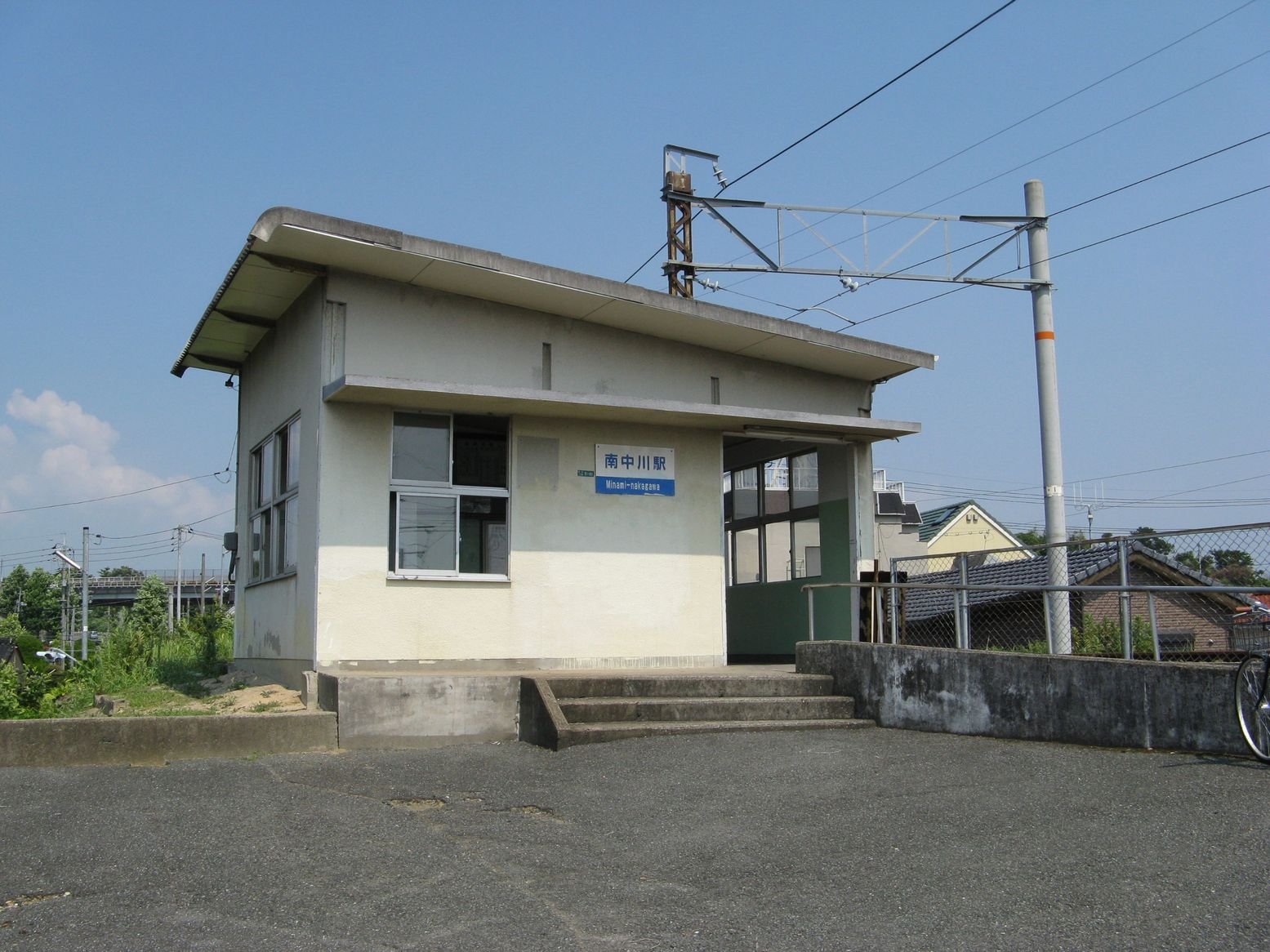 小野田線 南中川駅 駅舎